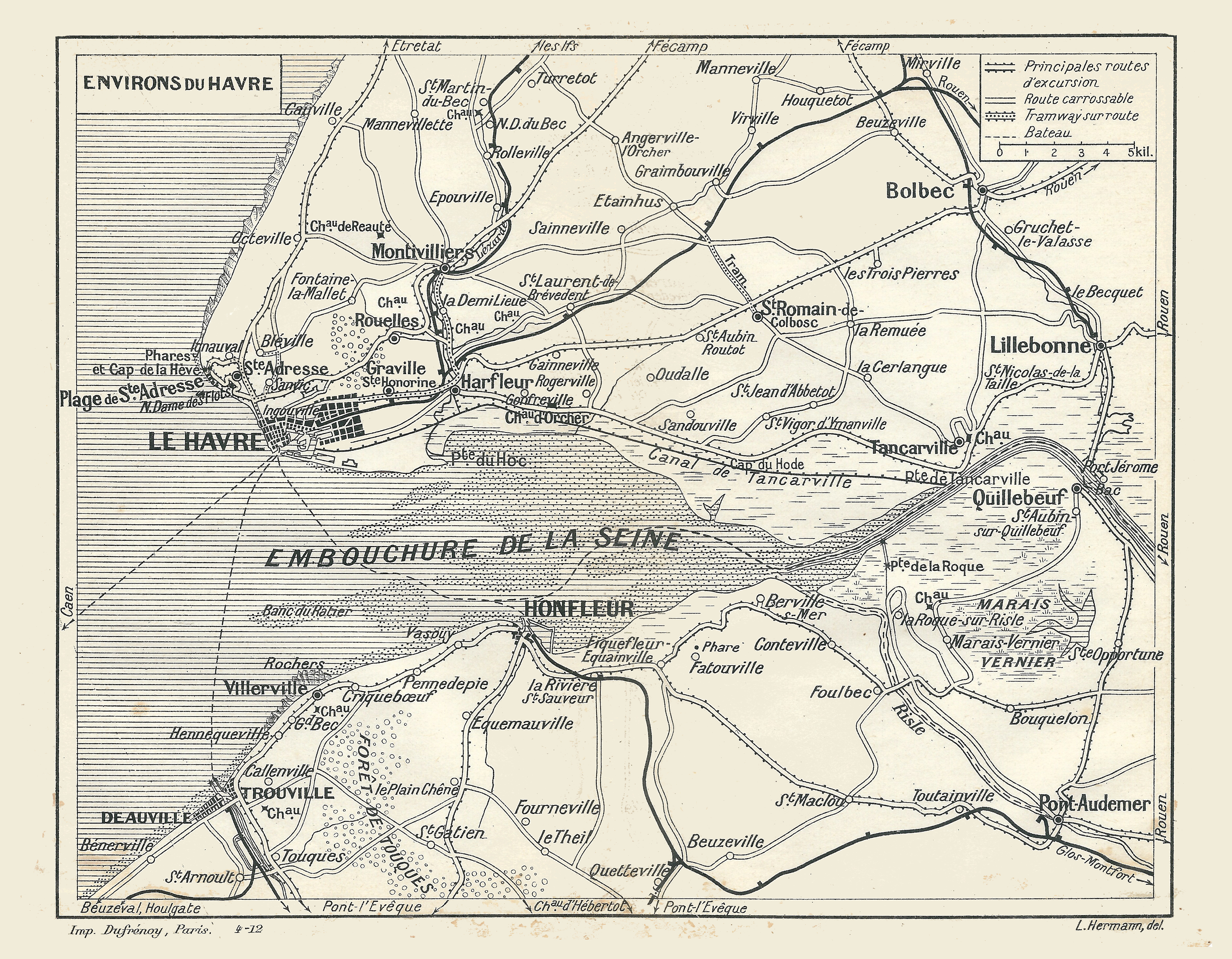 Quelqu'une des carte du Guide Joanne Normandie, année 1912